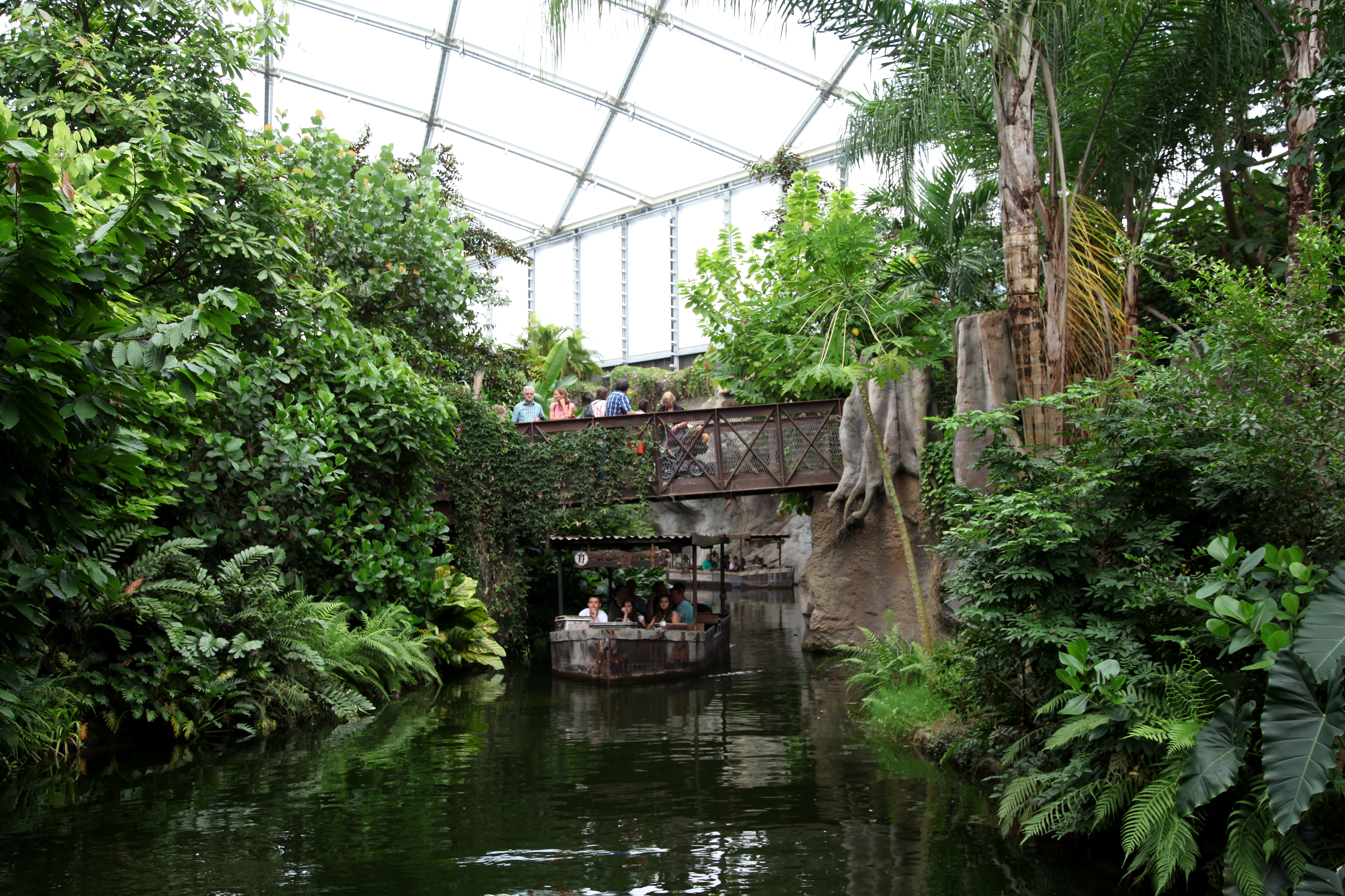 Gondwanaland im Zoo von Leipzig